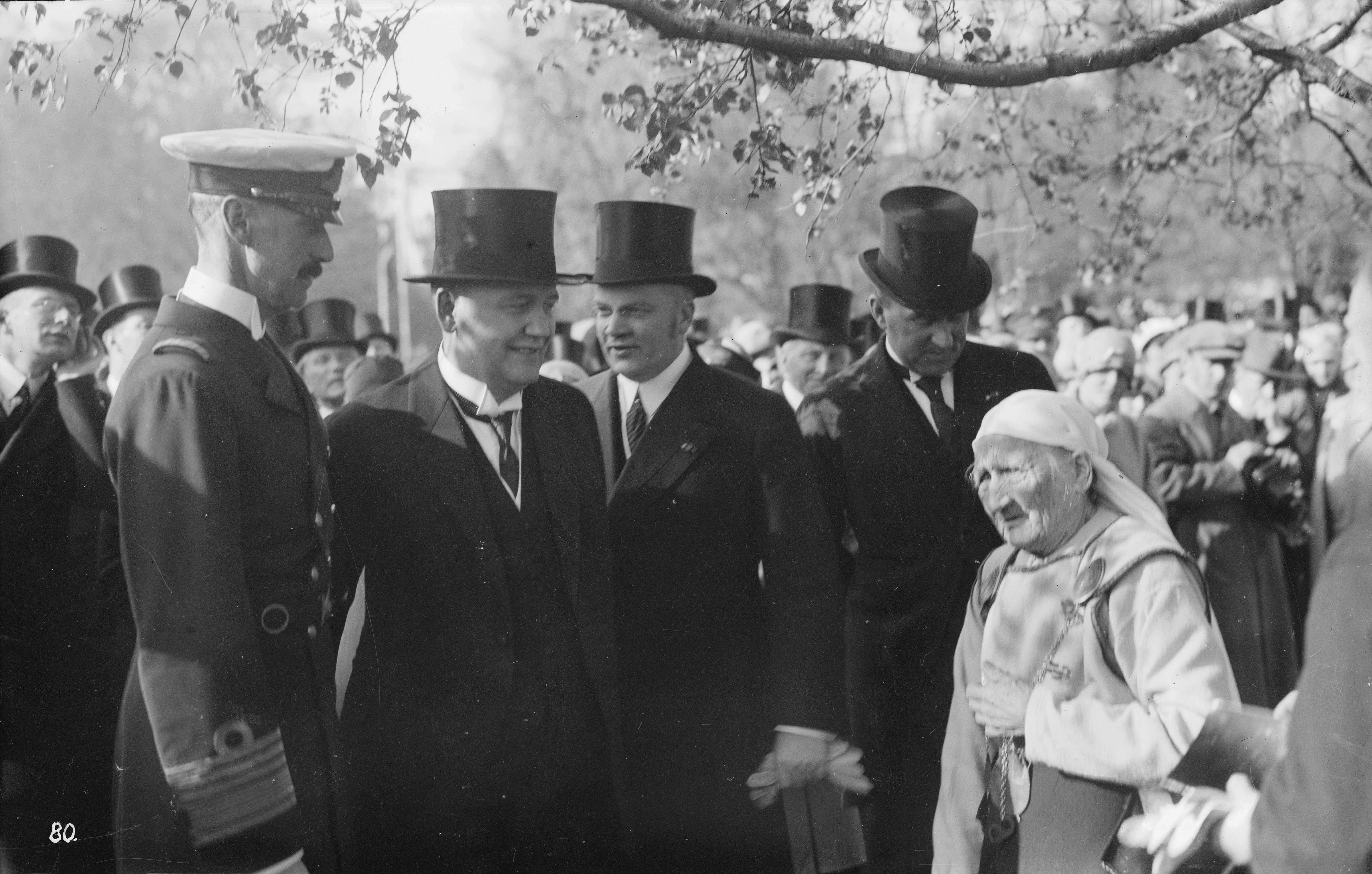 Runonlaulaja Matjoi Plattonen lauloi kuningas Haakonille ja presidentti Relanderille Kaivopuistossa; Kuningas Haakonin vierailun 2-4.6.1928 yhteydessä. Relanderin oik. puolella A. Tulenheimo ja E. v. Frenckell.